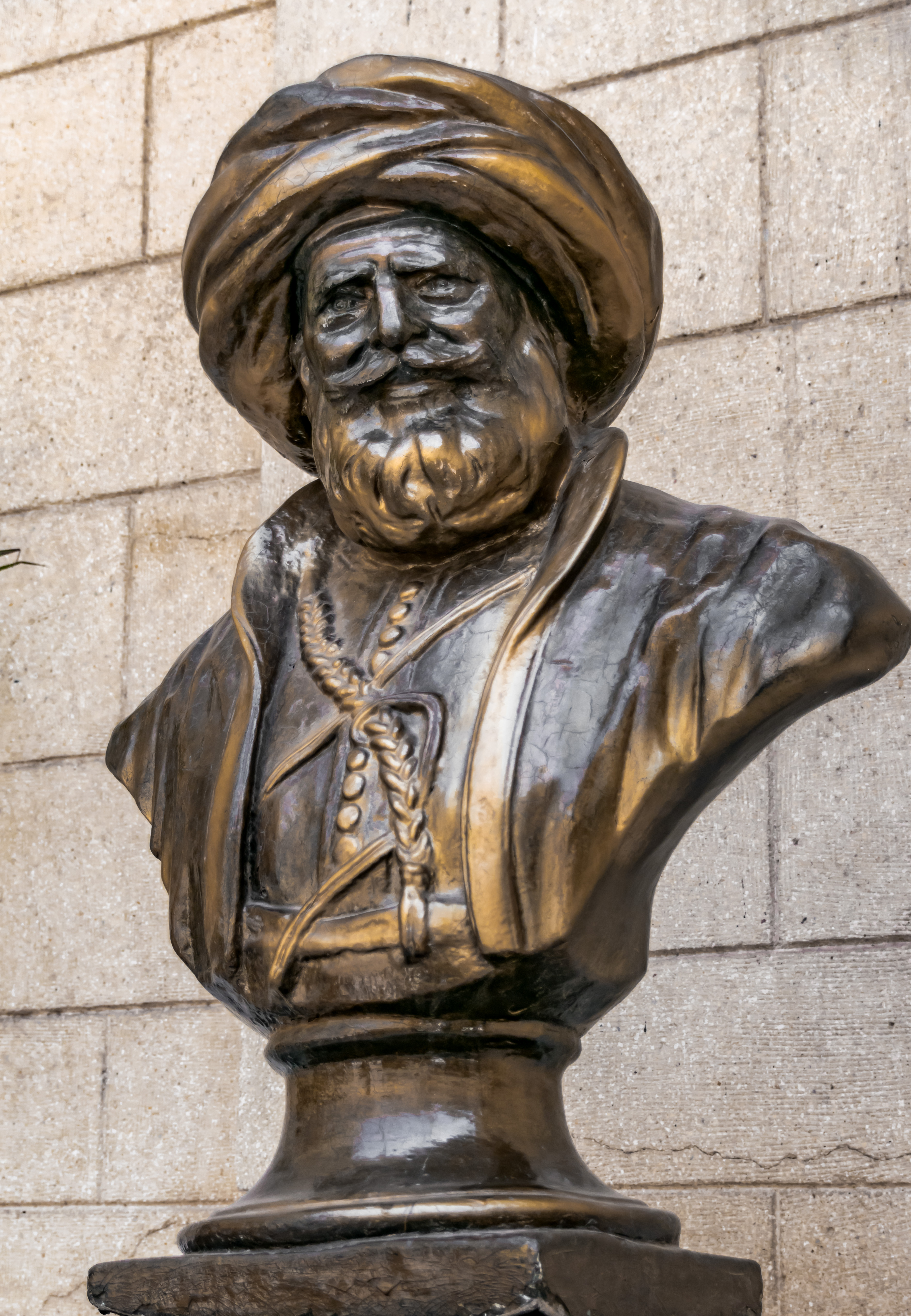 تمثال محمد على باشا ، مؤسس الاسرة المالكة فى مصر ، ولد فى بلدة قولة "شمال اليونان" عام 1769م ، تولى حكم مصر منذ عام 1805 - 1848م ، توفى فى عام 1849م بالاسكندرية ، ودفن بمسجده بالقلعة